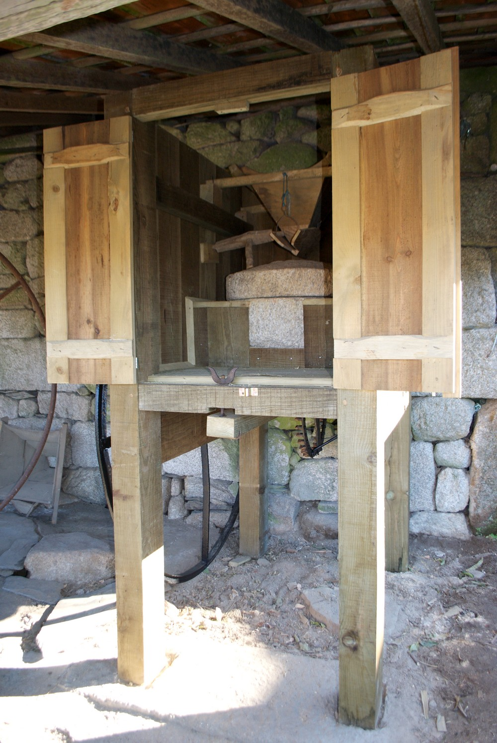 Moinhola (mó manual) localizada em Macieira de Alcôba, concelho de Águeda, musealizada no âmbito da Aldeia Pedagógica do Milho Antigo.